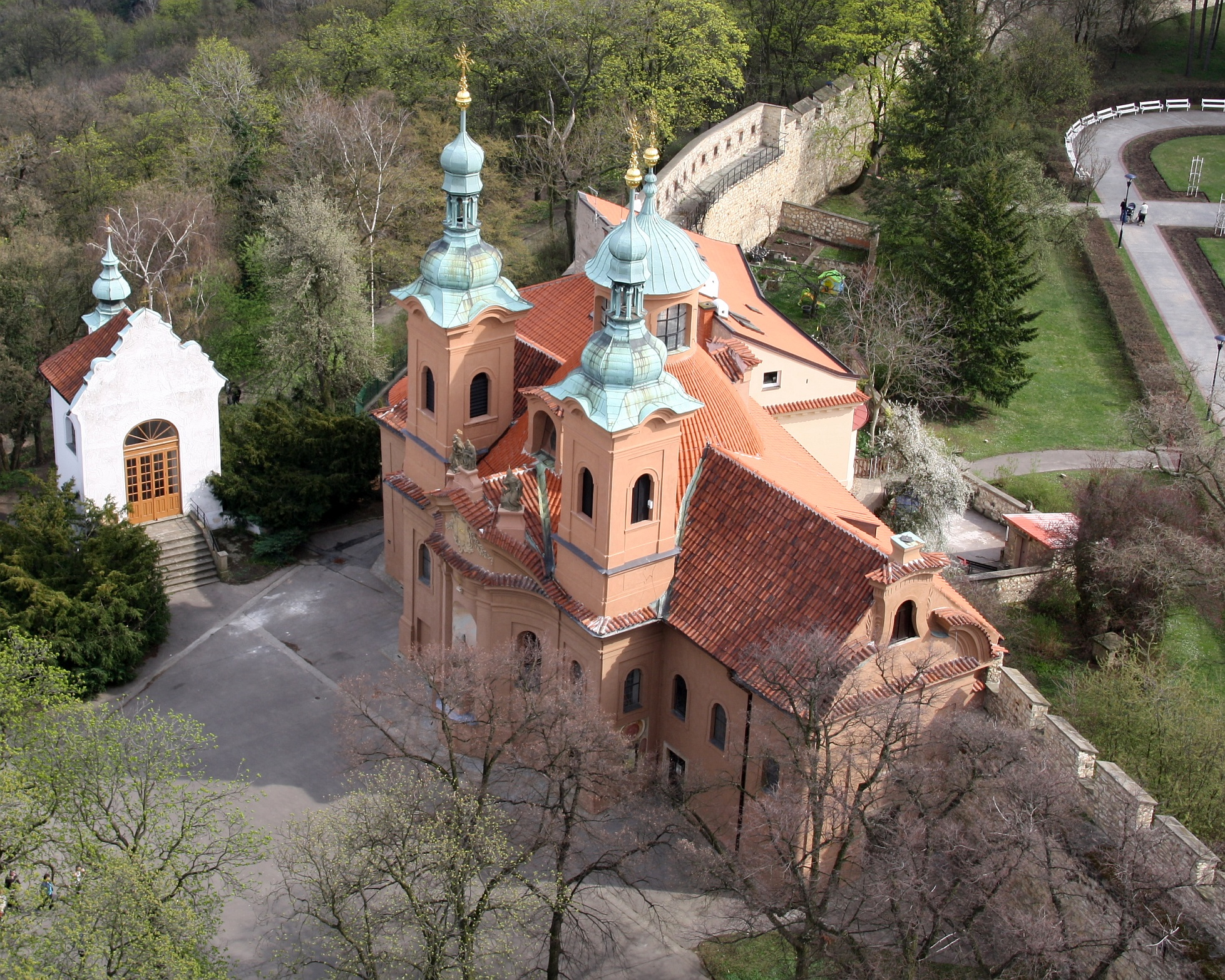 Kostel svatého Vavřince na Petříně, Praha 1-Malá Strana, Petřínské sady (park u rozhledny), Malá Strana.